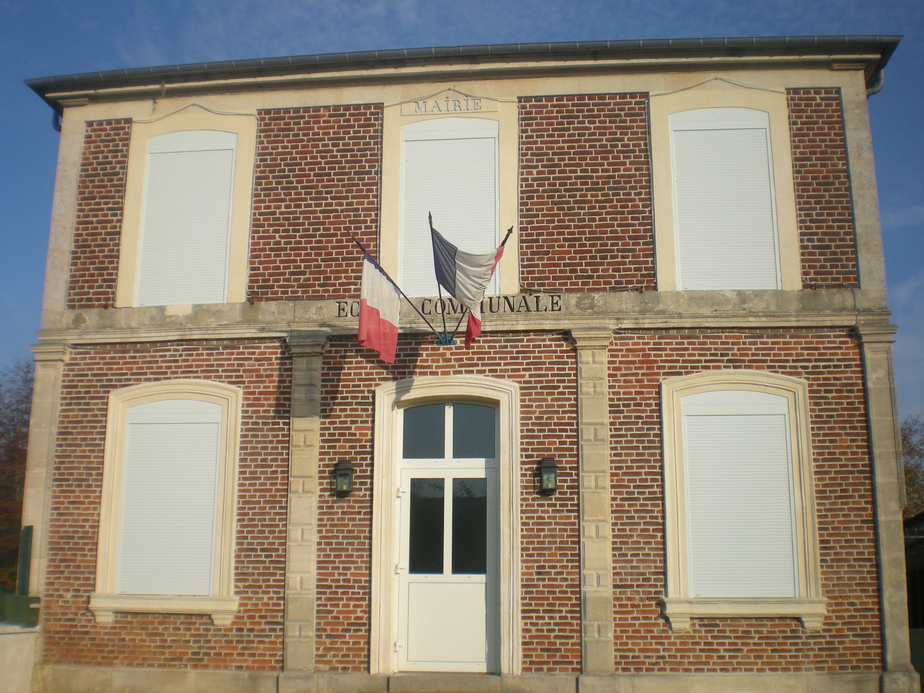 la mairie de Saint-Aubin-sous-Erquery